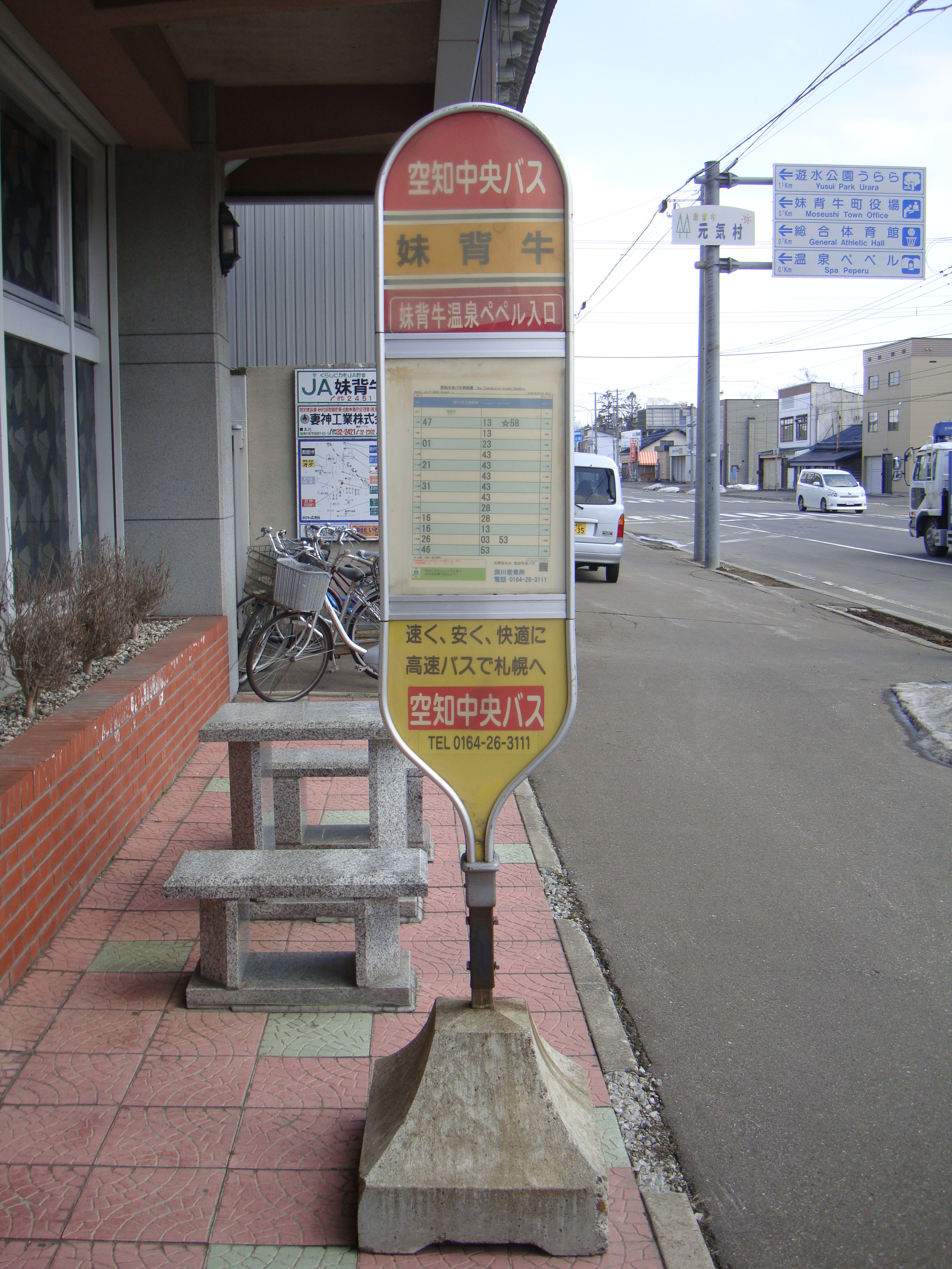 Moseushi